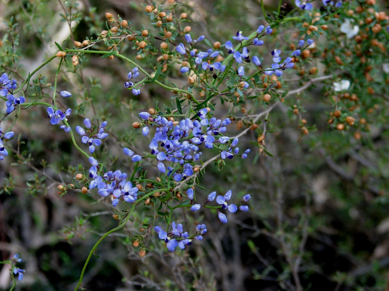 Comesperma volubile, Cranbourne, Victoria, Australia